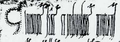 Chrismon und verbale Invocatio aus dem Diplom Heinrichs III. für St. Matthias zu Trier